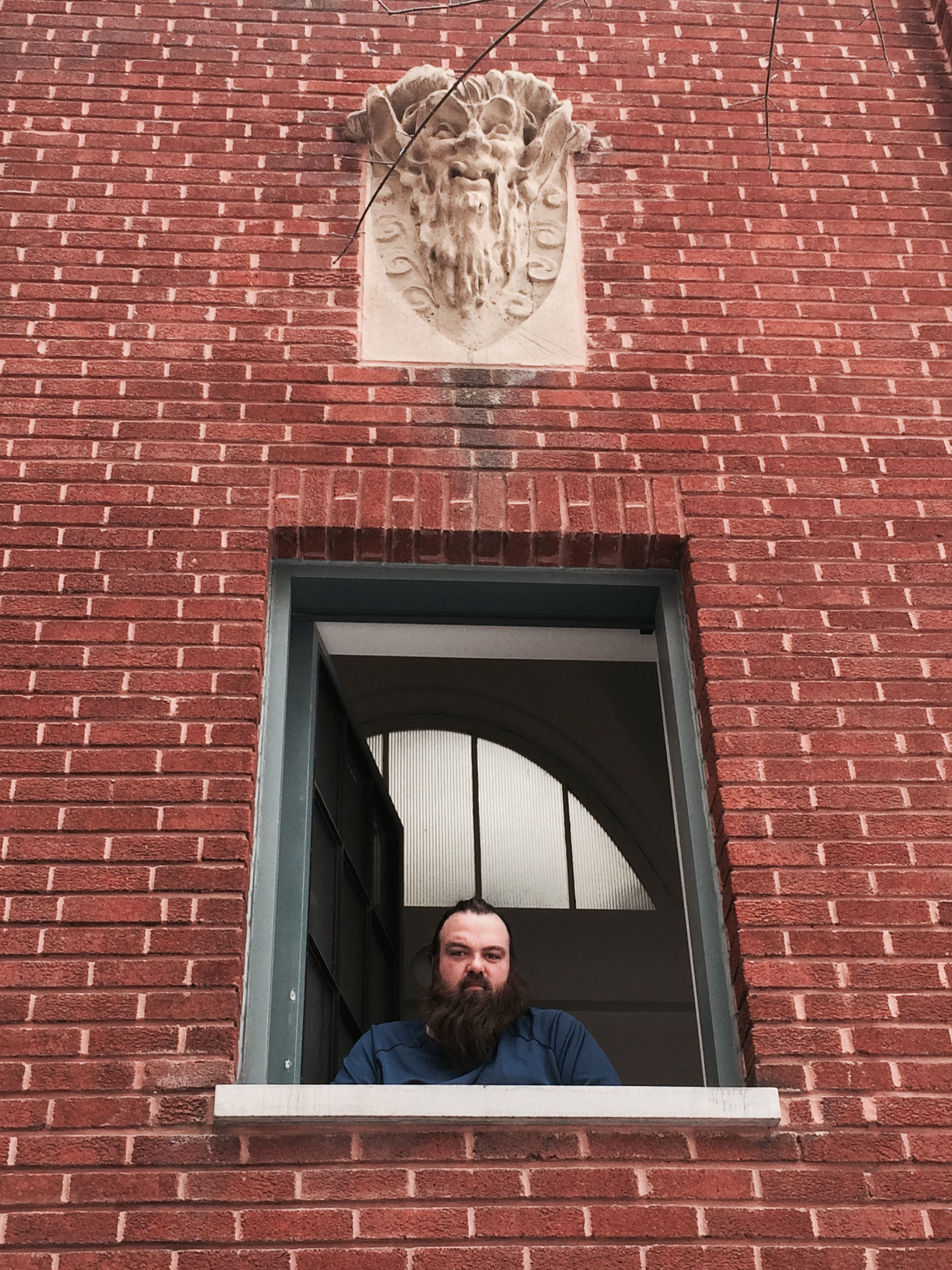 @ résidence Cormier, Montréal.